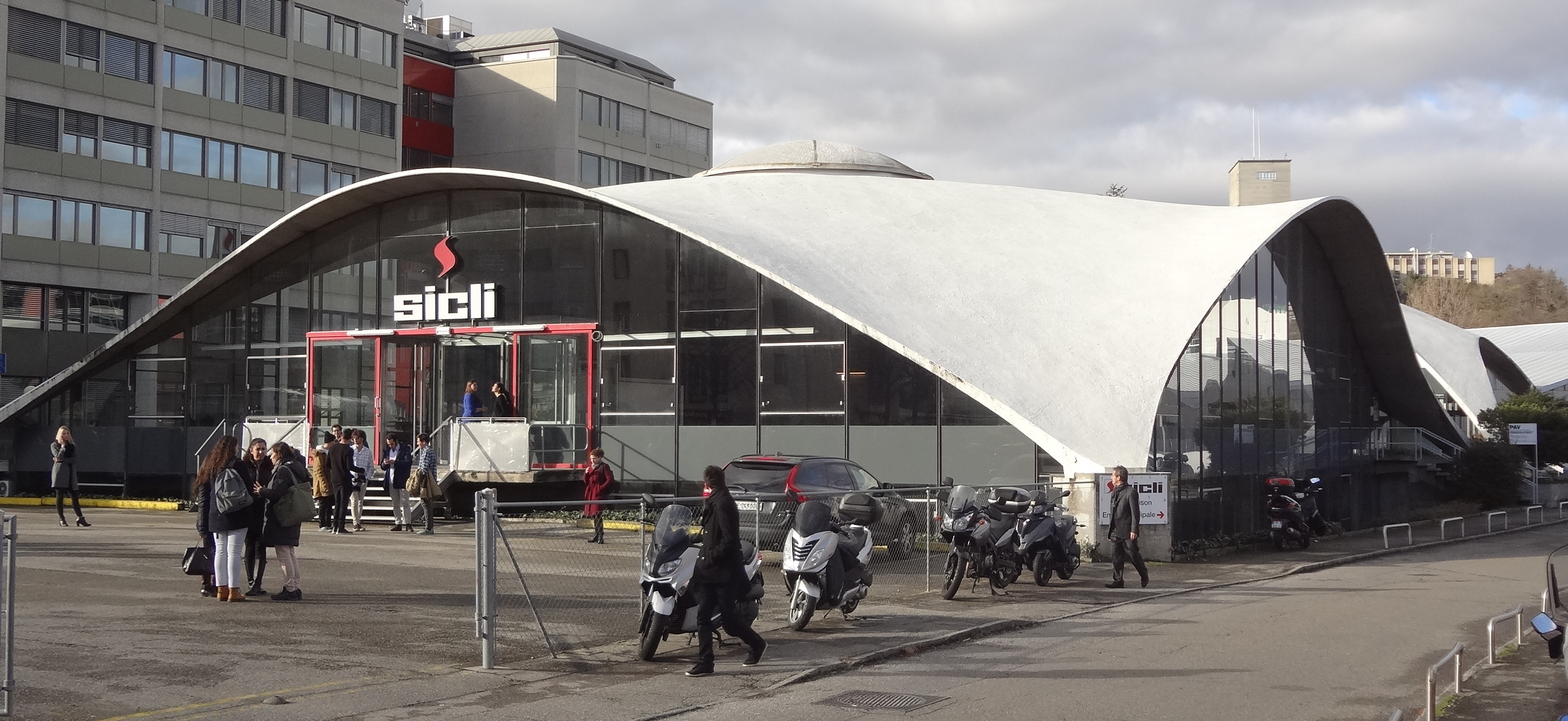 Pavillon « Sicli ». Bâtiment industriel construit aux Acacias à Genève par l'ingénieur civil Heinz Isler (de Burgdorf) et l'architecte Constantin Hilberer de Genève, pour la société « SICLI matériel incendies SA », en 1968-69. Acquis par l'État de Genève en 2011 pour le transformer en lieu culturel. Situé dans le secteur Praille - Acacias - Vernets.